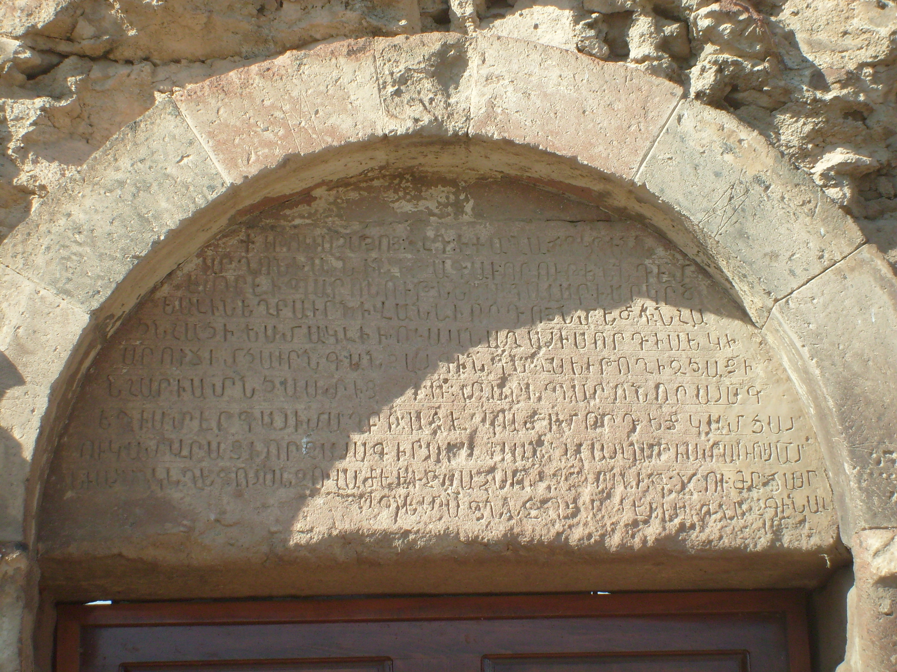 Արուճի եկեղեցական համալիր Ս. Գրիգոր (Արուճի կաթողիկե) 22/8